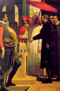 Michelangelo che dà il modellino di San Pietro a Giulio II.